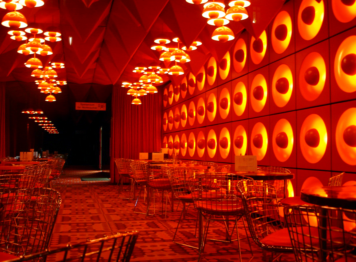 Kantine des Spiegel-Verlagshauses, Brandstwiete 19, 20457 Hamburg, vor dem Umzug des Spiegel-Verlags im September 2011